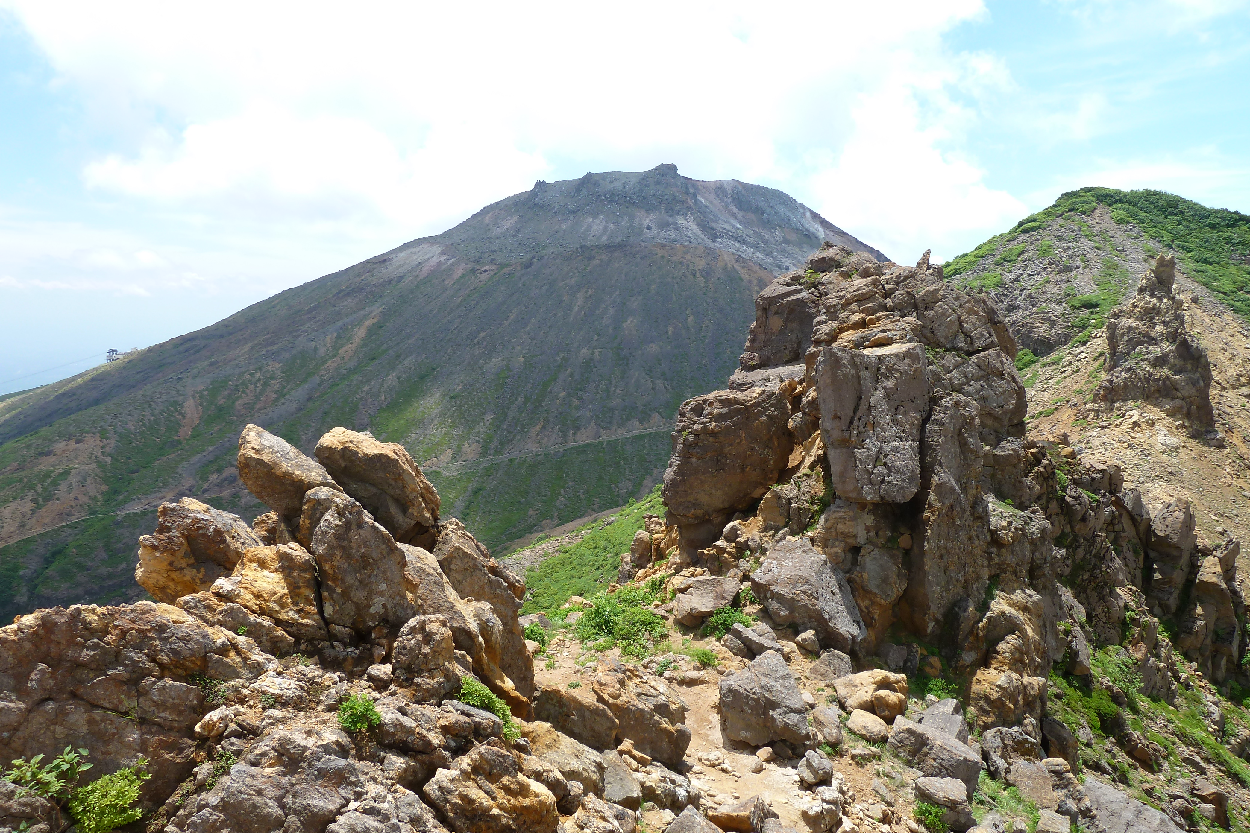 剣ヶ峰北側から望む茶臼岳